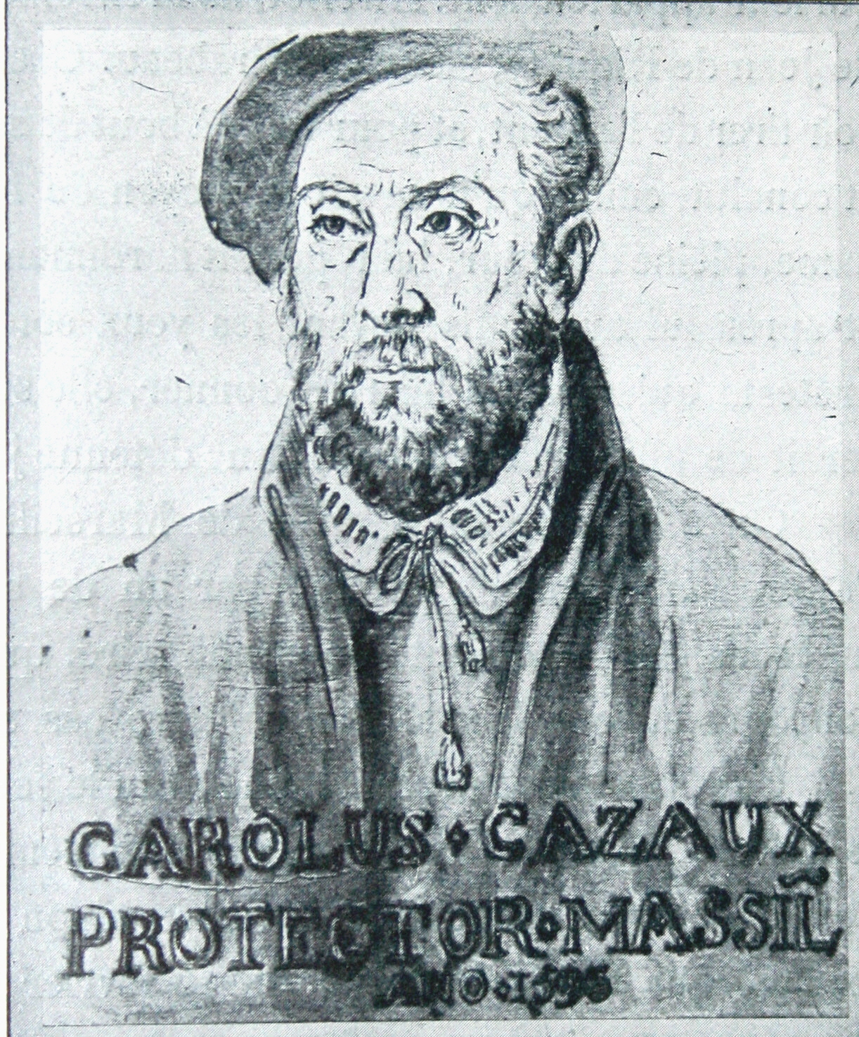 Charles de Casaulx (1547-1596). Dessin à l'encre de chine, vers 1900.